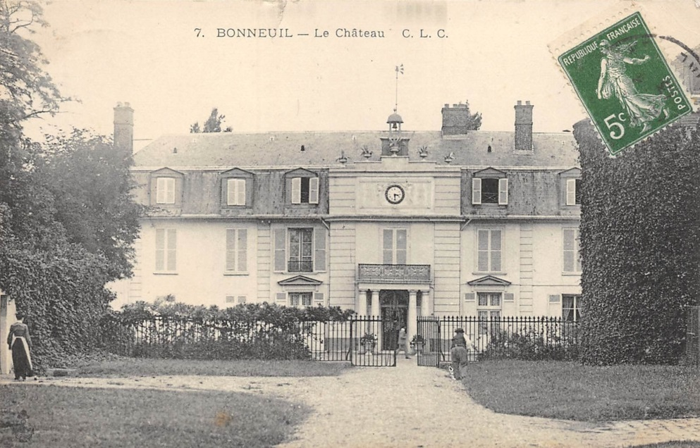 Carte postale - Bonneuil - Le château